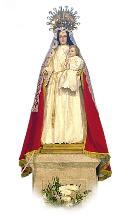 Virgen, Ntra. Sra. del Fresno